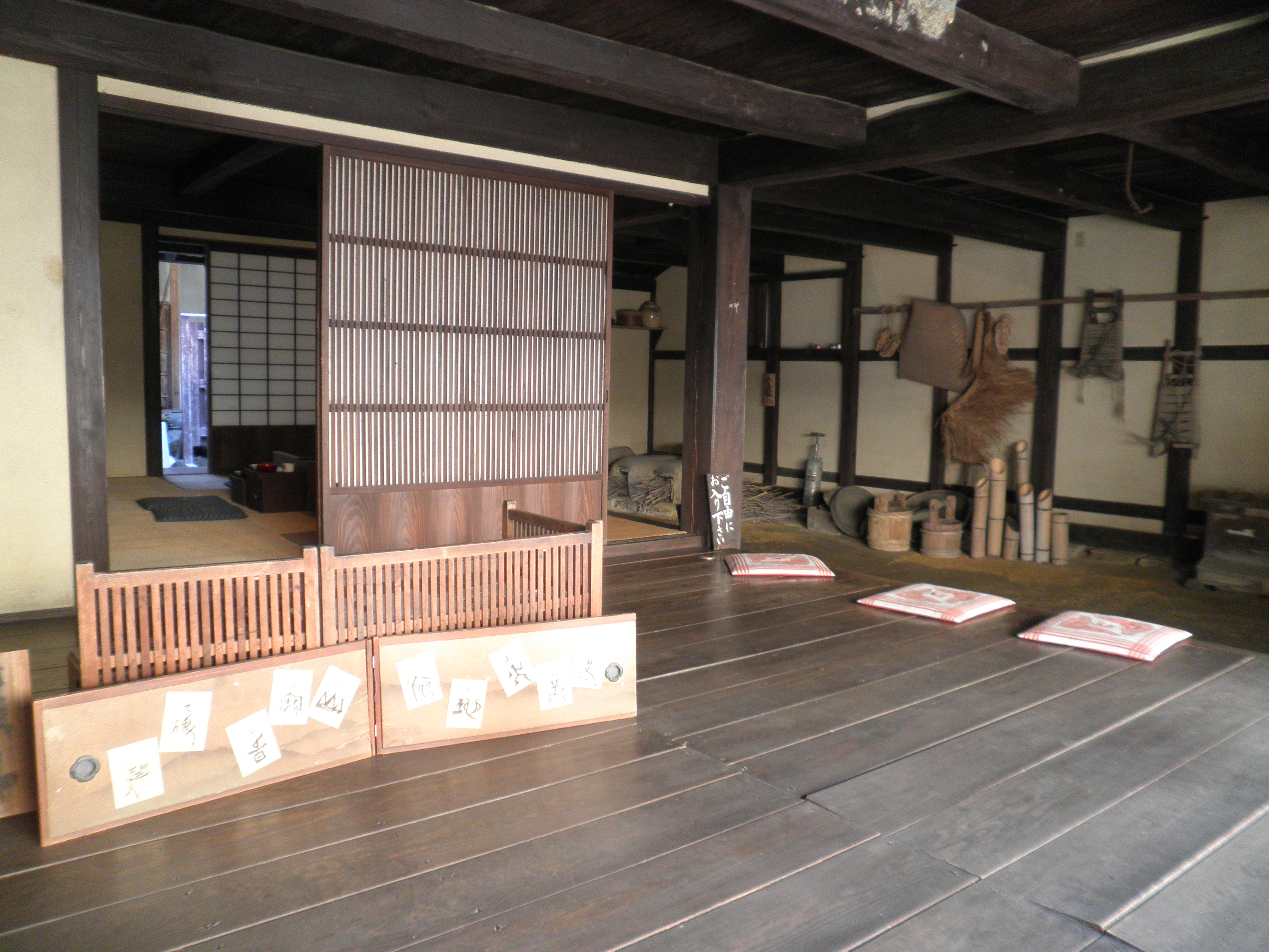 八日市護国地区にある商いと暮らしの博物館の内部